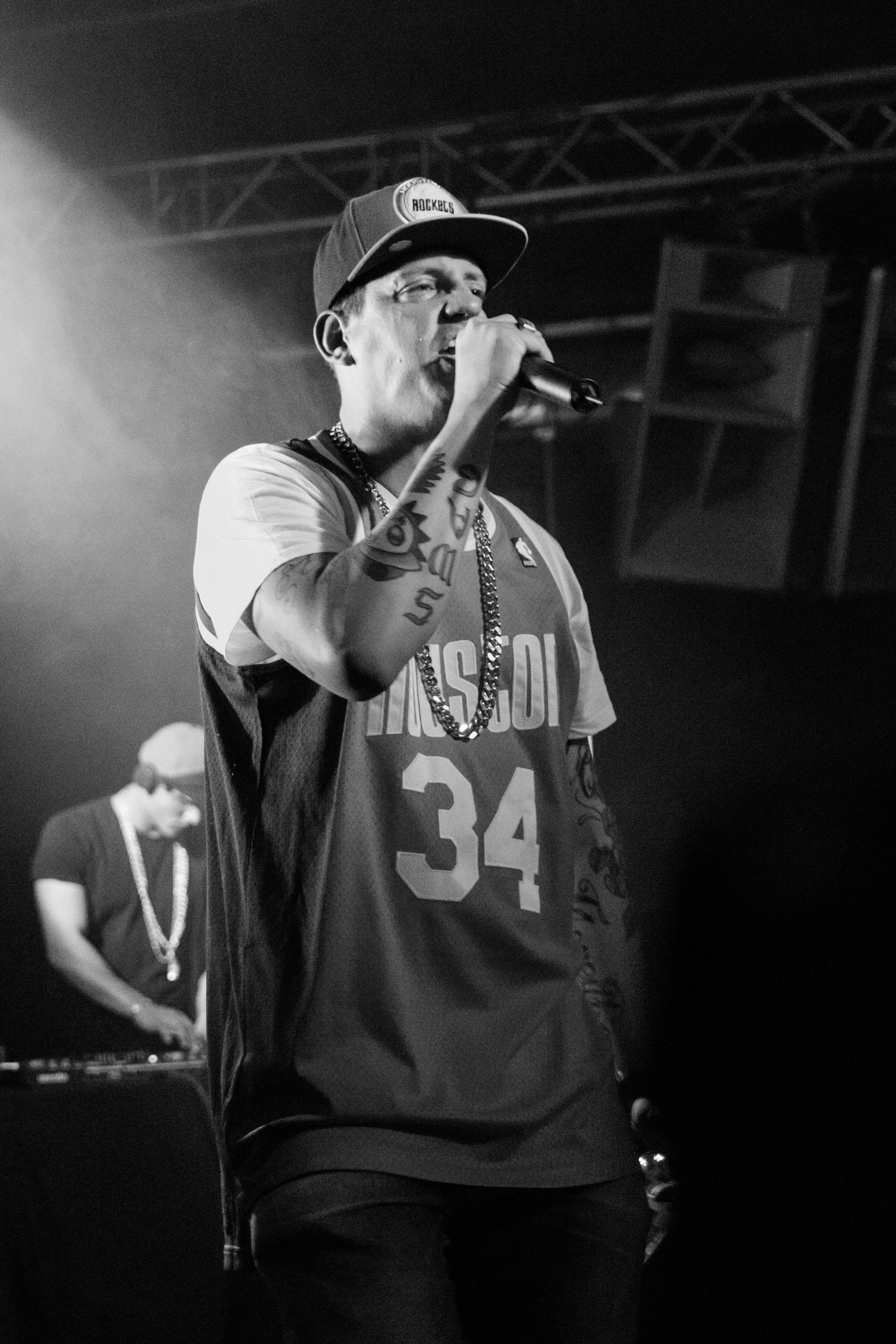 Money Boy bei einem Auftritt in Schmitz Katze in Freiburg im Breisgau am 3. September 2015